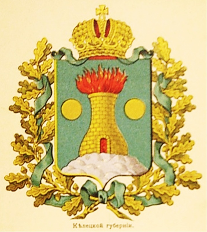 Russian Empire coat of arms Kelets Governorate. Paper non-post card of Russian Empire. Герб Российской Империи Келецкой губернии издания Сукачова, СПб. Непочтовая карточка Российской Империи.